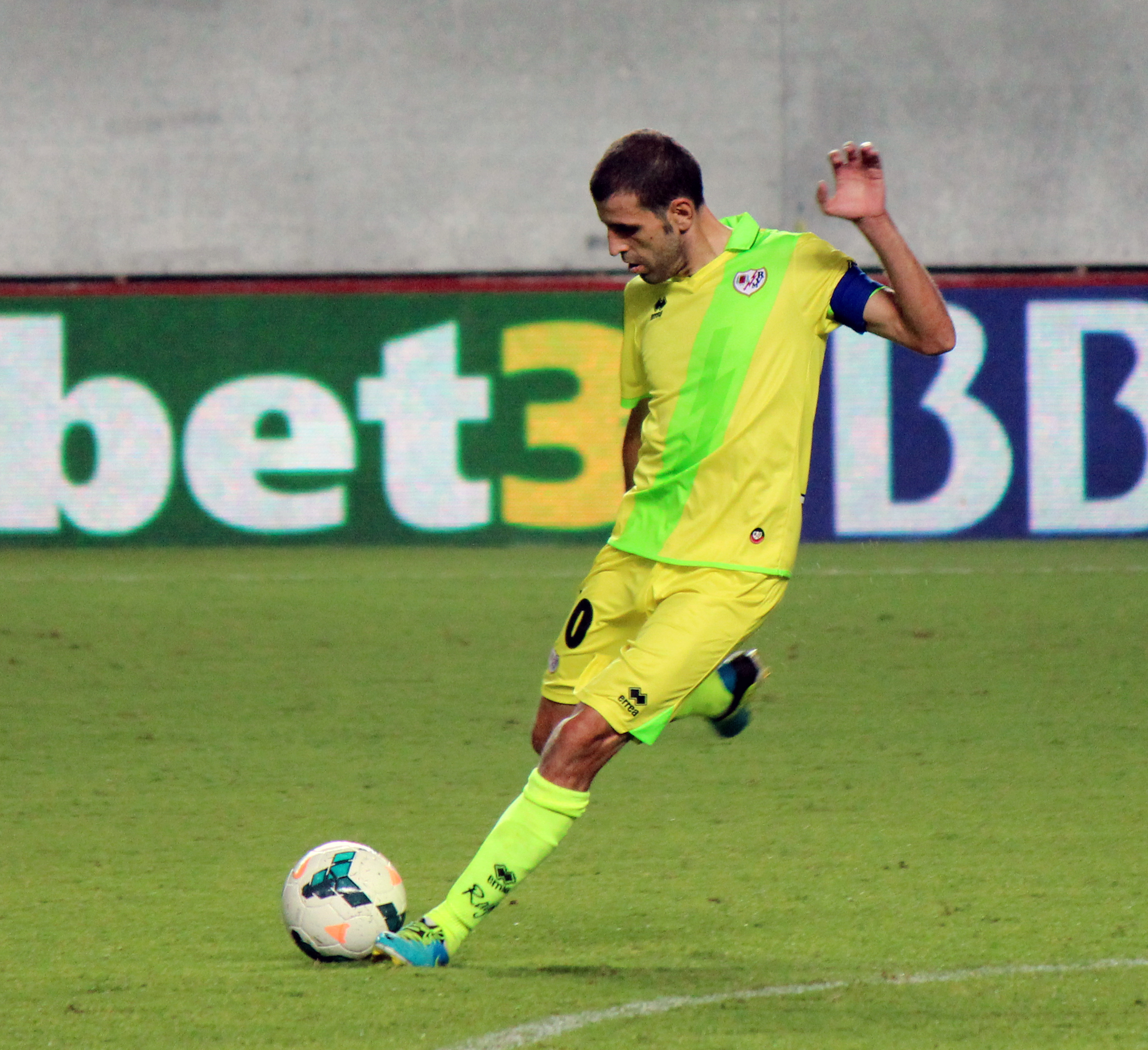 Trashorras en un partido con el Rayo Vallecano